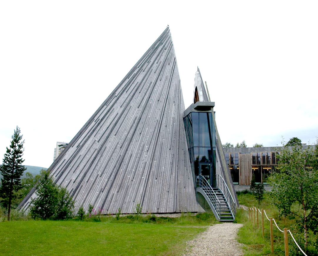 Sametinget